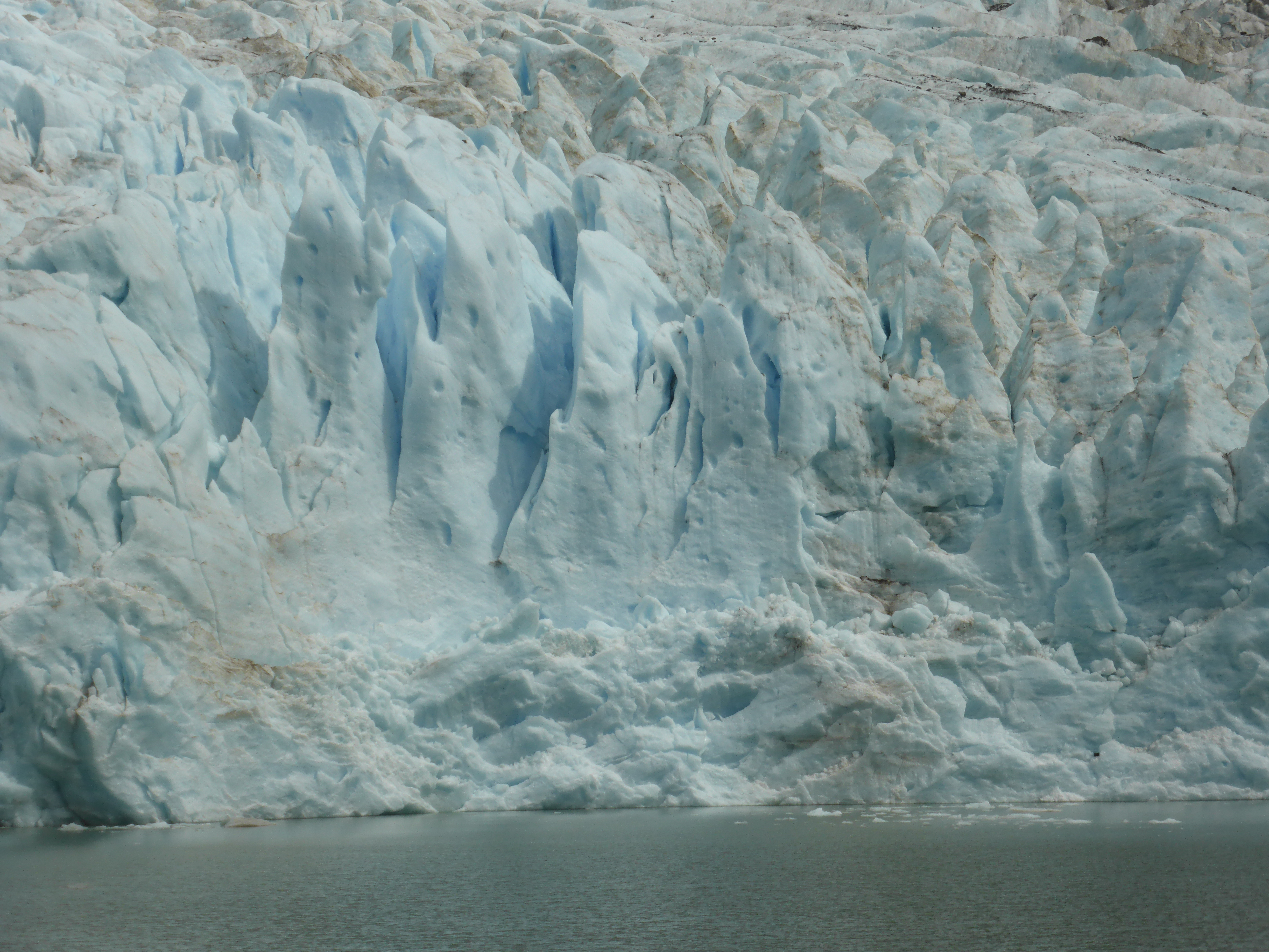 En el glaciar Serrano vemos antiguos hielos de color azul. Forma parte del extenso "Parque Nacional Bernardo O'Higgins", en la región de Magallanes, al sur de Chile. Navegando por el seno Última Esperanza o fiordo Última Esperanza.